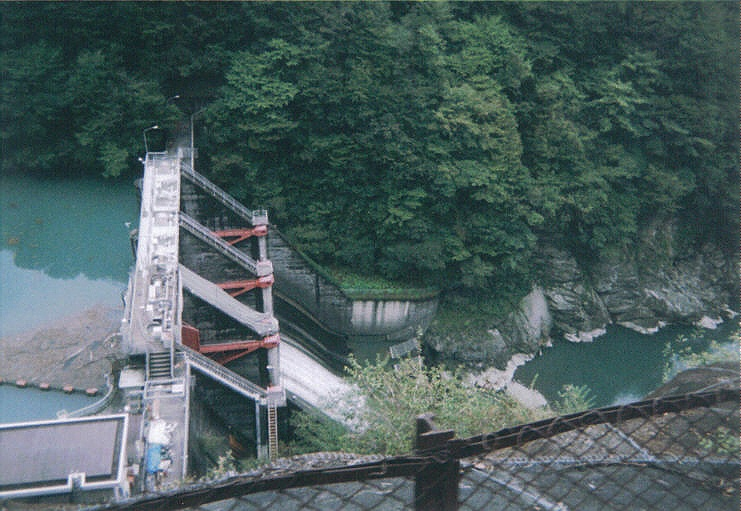 Dam